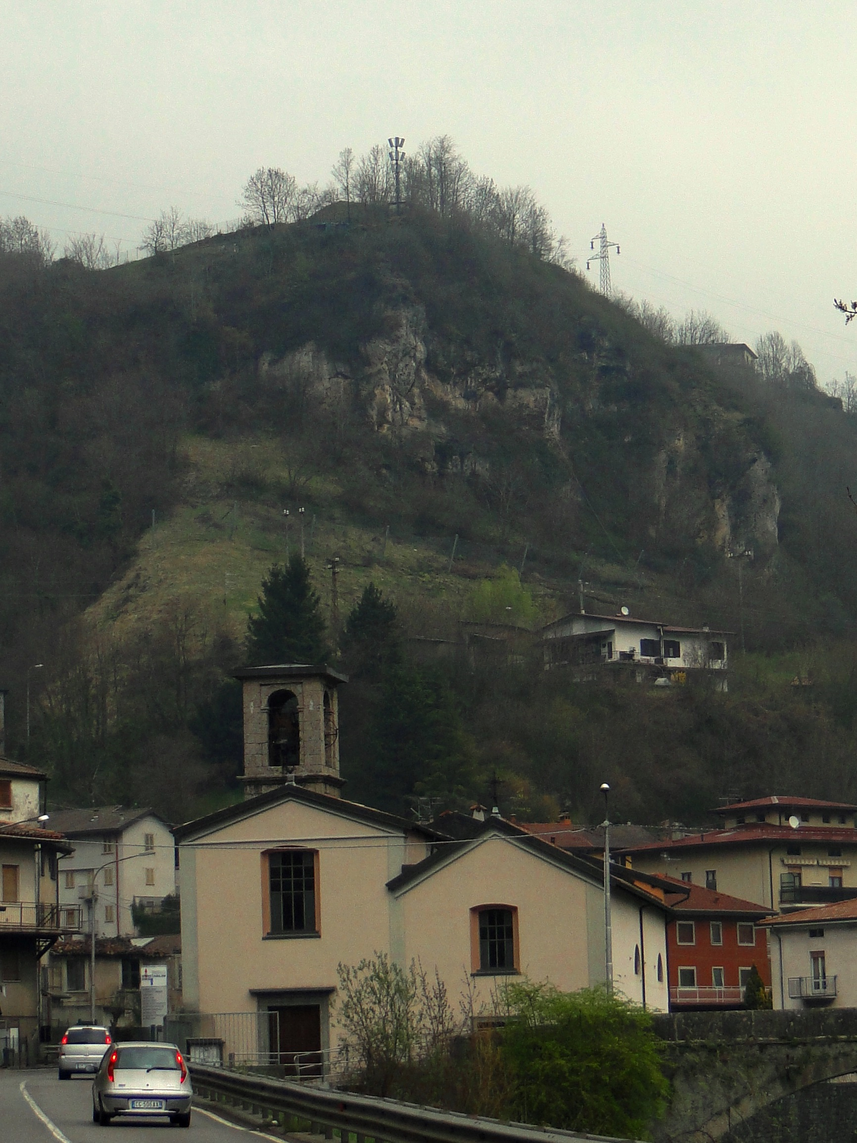 Ponte Nossa. Chiesa di san Bernardino